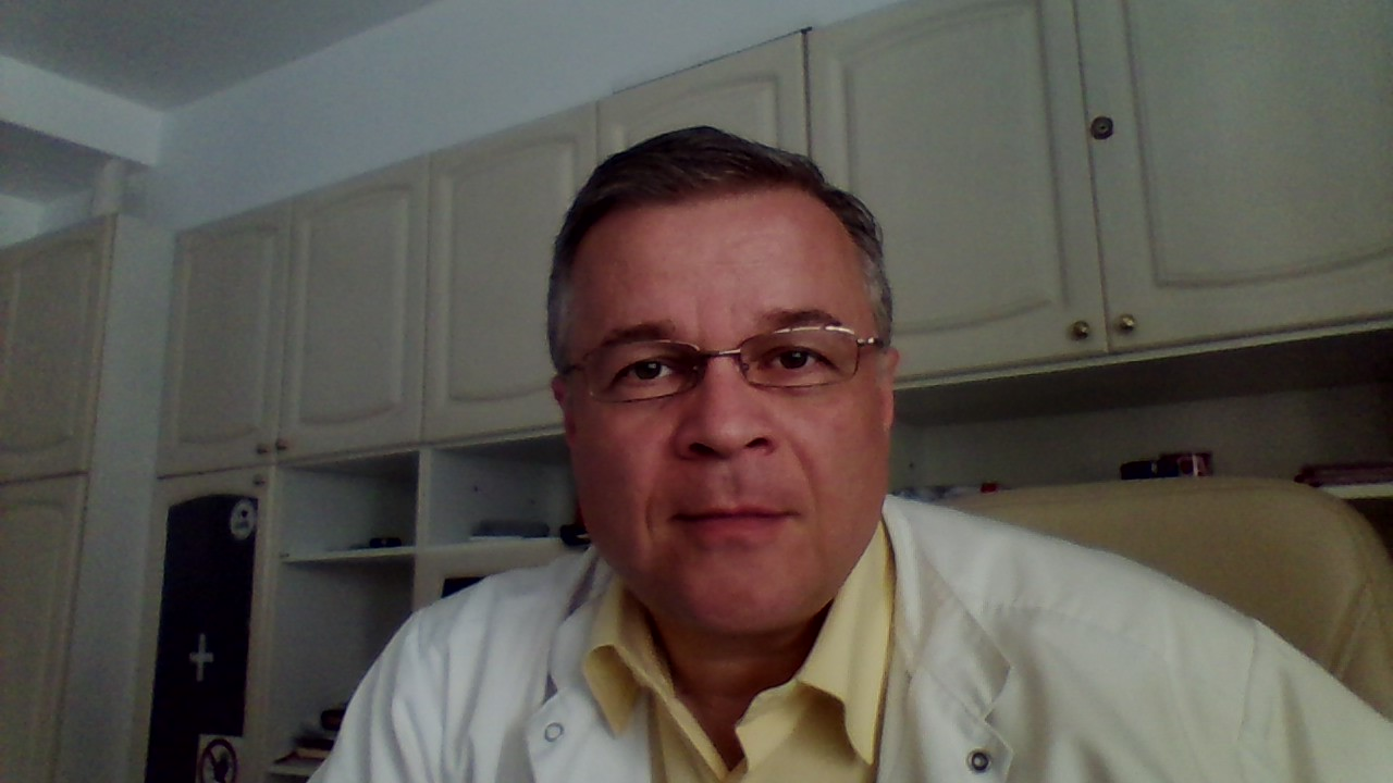 poza efectuată la cabinet în 2019